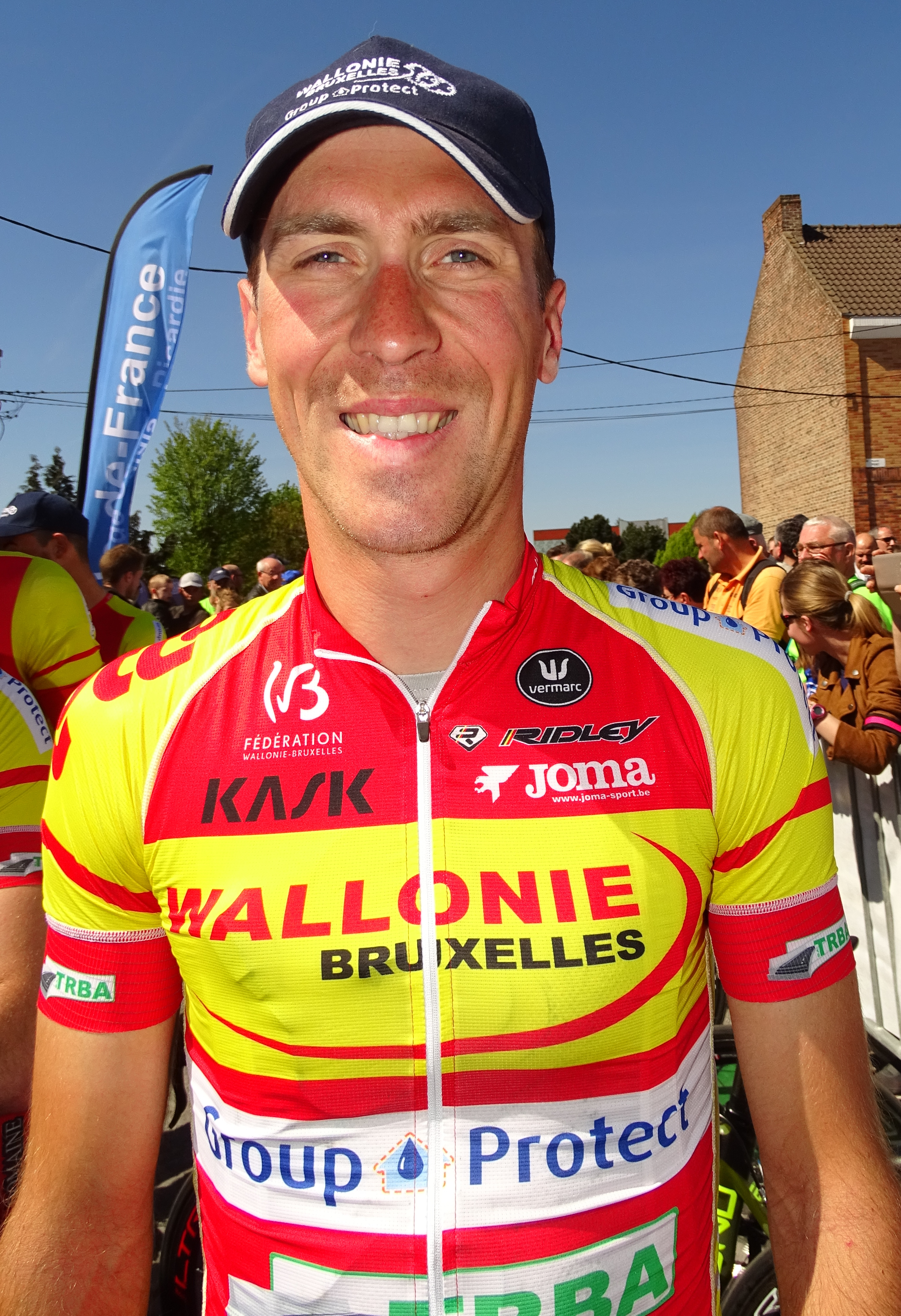 Reportage réalisé le jeudi 5 mai 2016 à l'occasion du départ et de l'arrivée de la deuxième étape des Quatre jours de Dunkerque 2016 à Aniche, Nord, Nord-Pas-de-Calais, France.